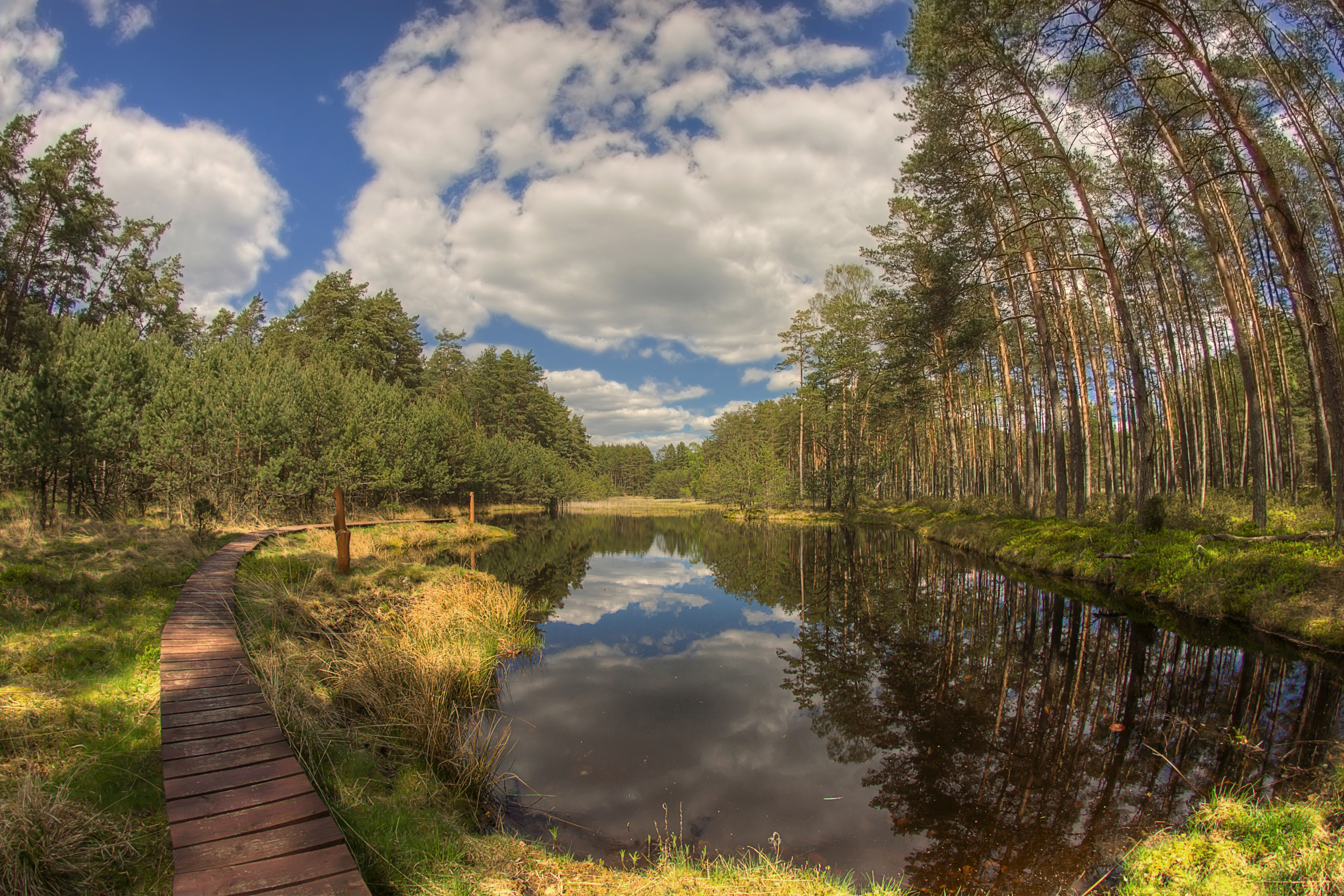 Obszar specjalnej ochrony ptaków Bory Tucholskie. This is a photography of Natura 2000 protected area with ID PLB220009